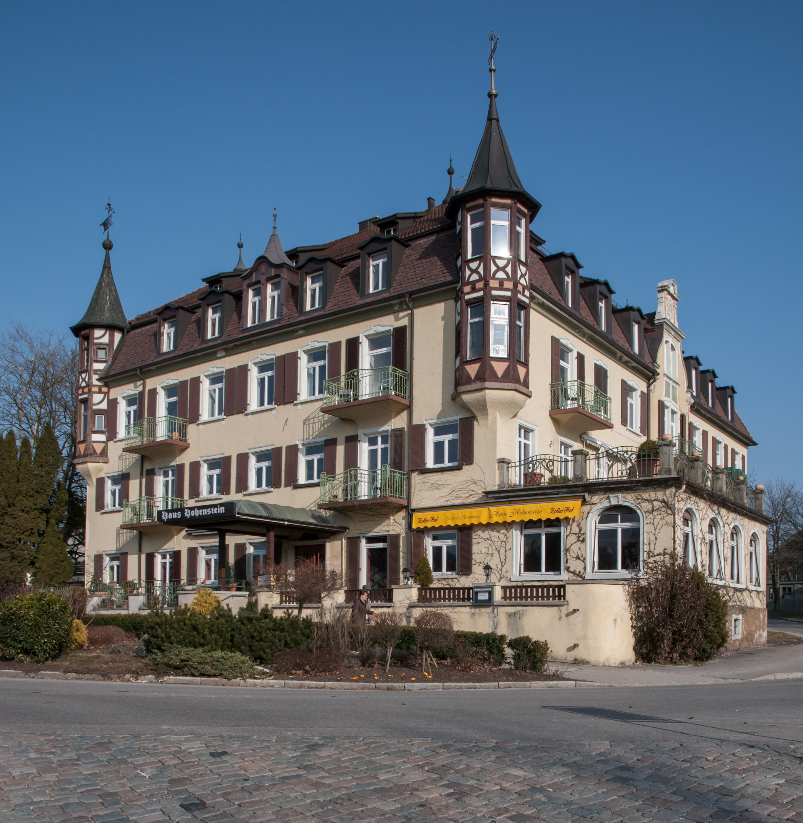 Haus Hohenstein, Ferienwohnungen und Cafe in Heiligenberg, Bodenseekreis